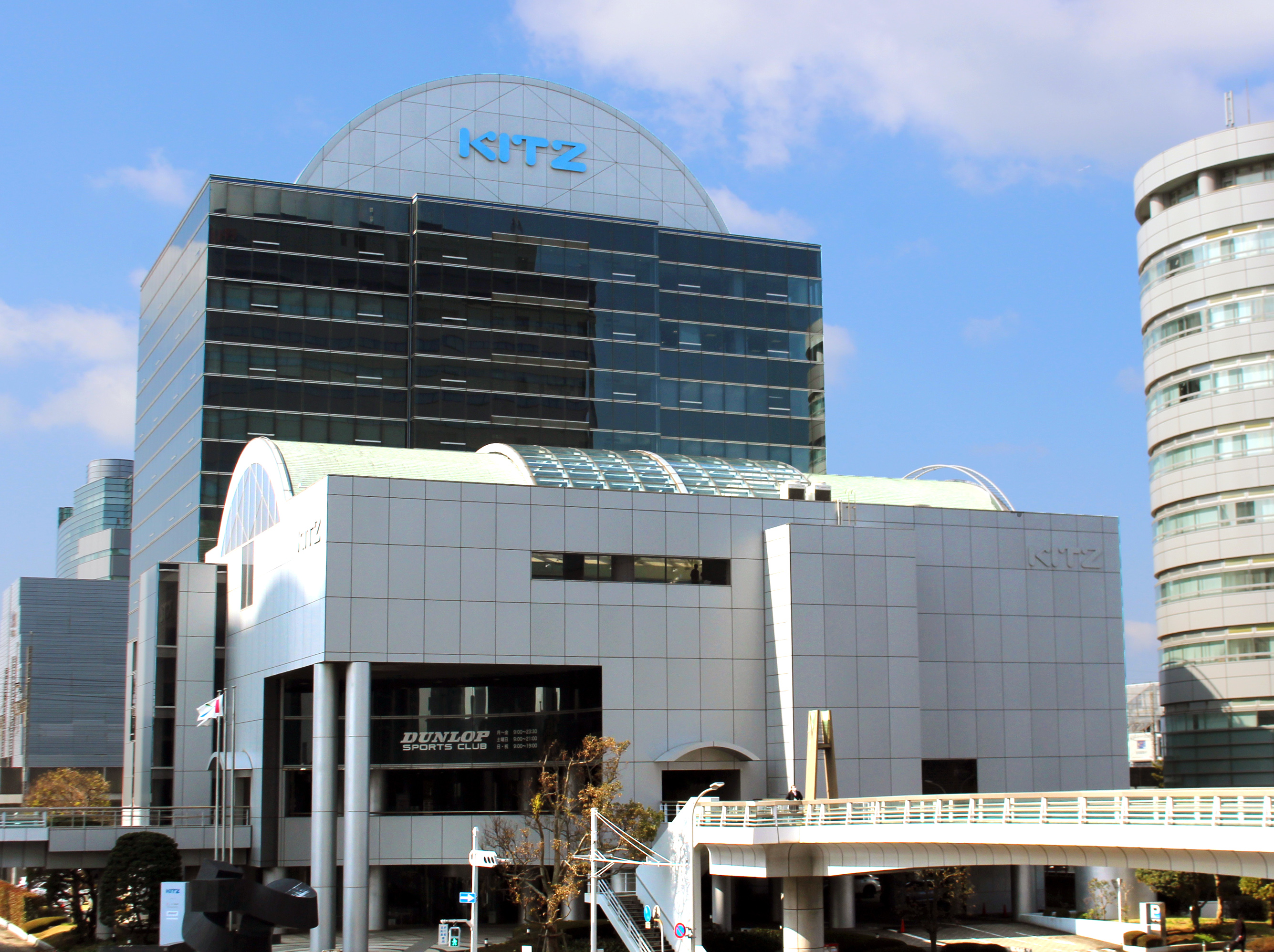 キッツ本社ビル